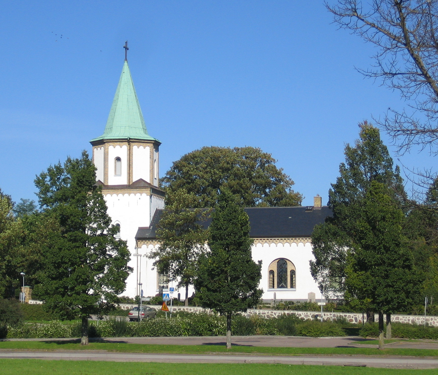 Västra Skrävlinge kyrka in Malmö.